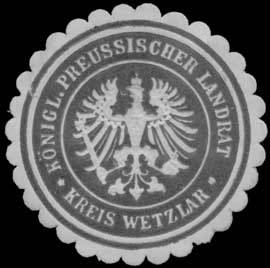 Sealing stamp Title: K.Pr. Landrat Kreis Wetzlar Description: schwarz, weiß, geprägt Place: Wetzlar size: 3 cm